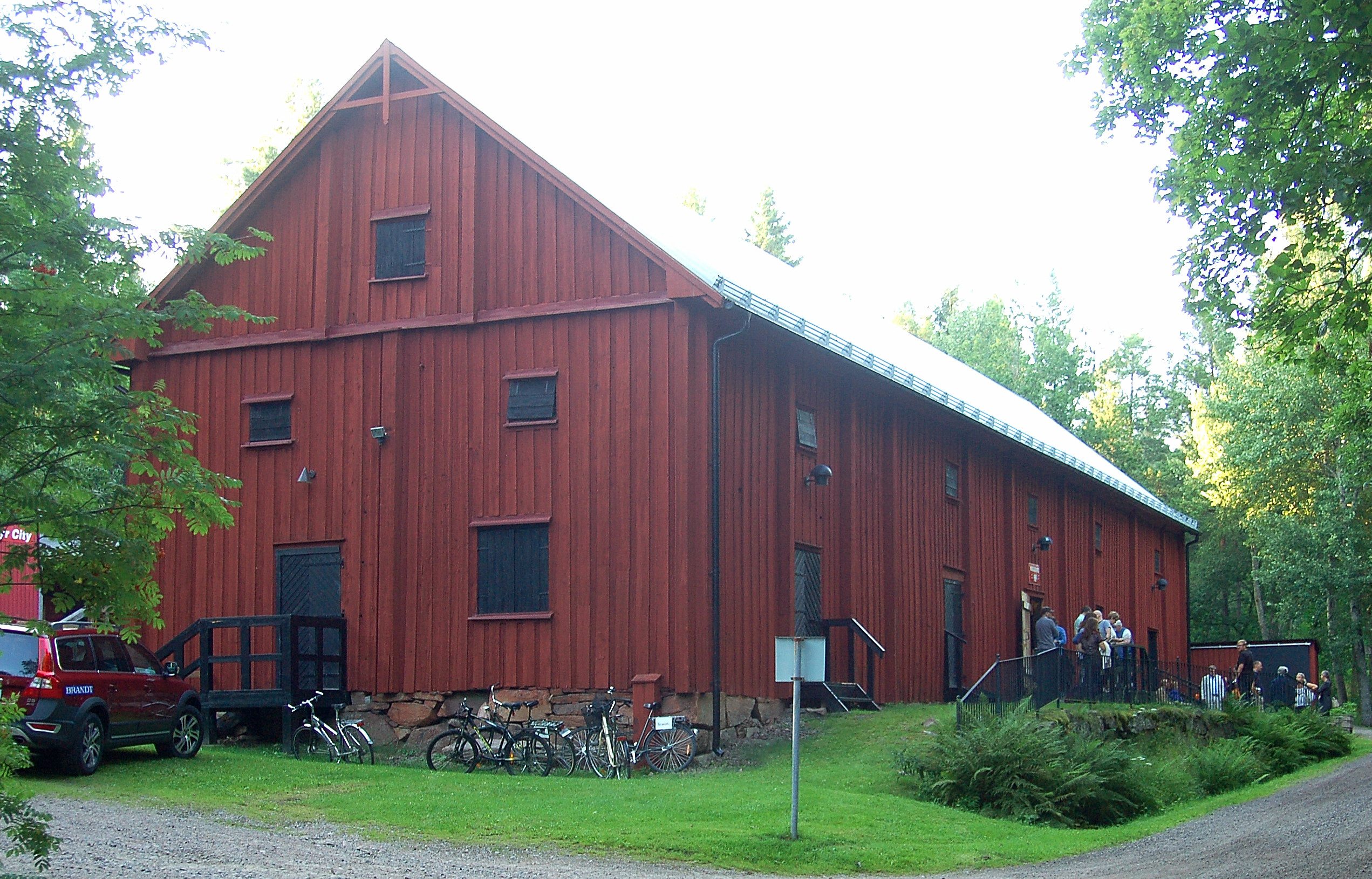 Brännvinsmagasinet som numera en teaterlokal vid Alsters herrgård